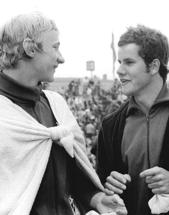 Roger Pyttel, Wolfram Sperling ADN-ZB Mittelstädt 12-7-73 Berlin: 24. DDR-Meisterschaften im Sportschwimmen im Freiwasserbecken des Dynamo-Sportforums-""Dicke"" Freunde- aber harte Konkurrenten. Am ersten Wettkampftag holten sich beide ihre ersten diesjährigen Meistertitel. Roger Pyttel über 100 m Freistil und Wolfram Sperling (rechts) über 400 m Lagen. Im Finale am 12.7.73 über 400 m Freistil treffen die beiden Leipziger DHfK-Sportler nun direkt aufeinander. Rekordhalter und Titelverteidiger ist Wolfram Sperling.